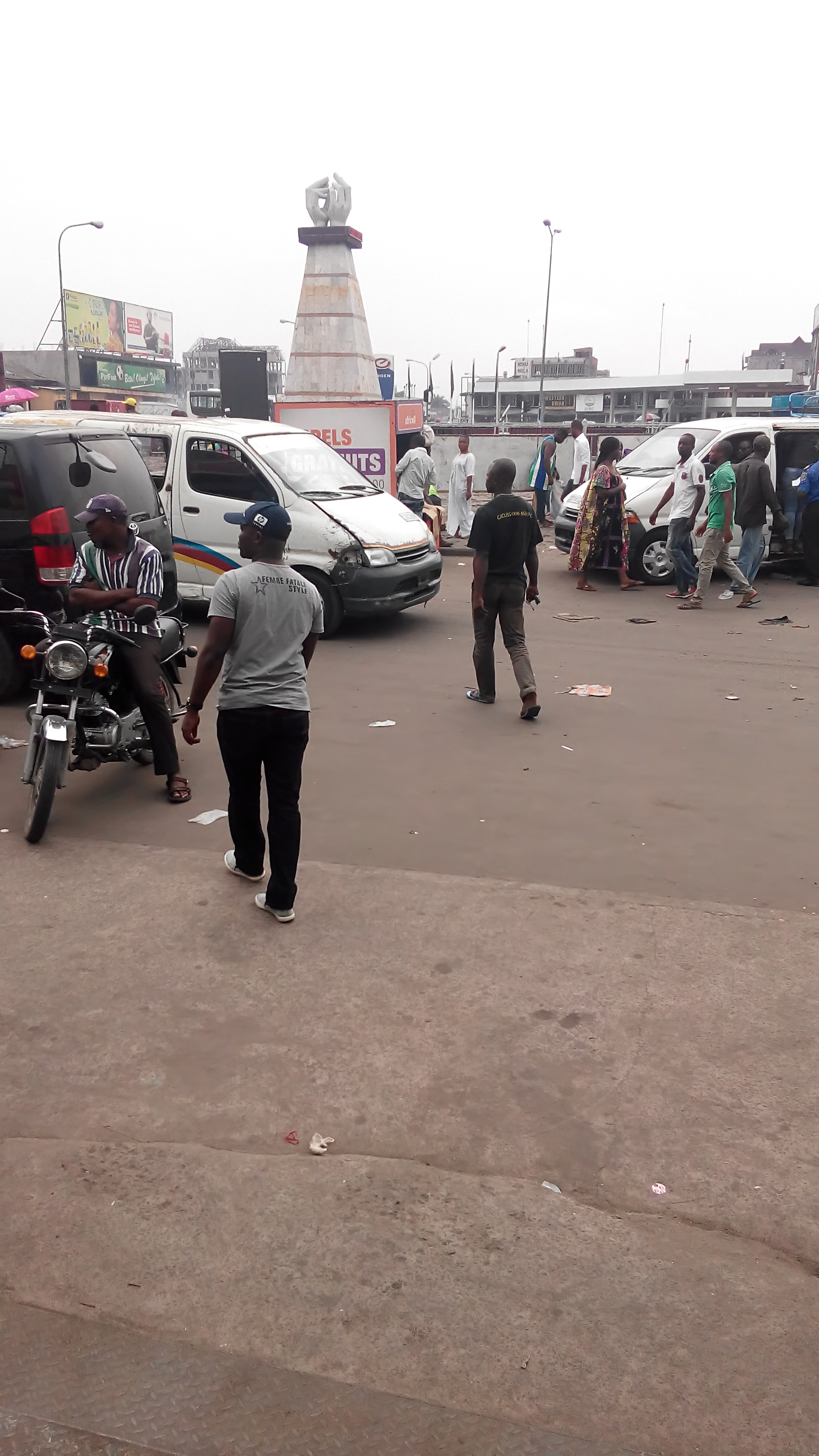 Des minibus à la place de la victoire. Au niveau de la place de la victoire, des minibus qui embarquent pour différentes destinations